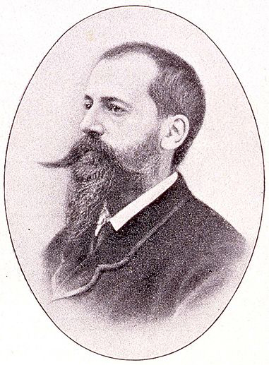 Portrait d'Edouard Beugniot (1822-1879) publié en 1902 par la Société industrielle de Mulhouse